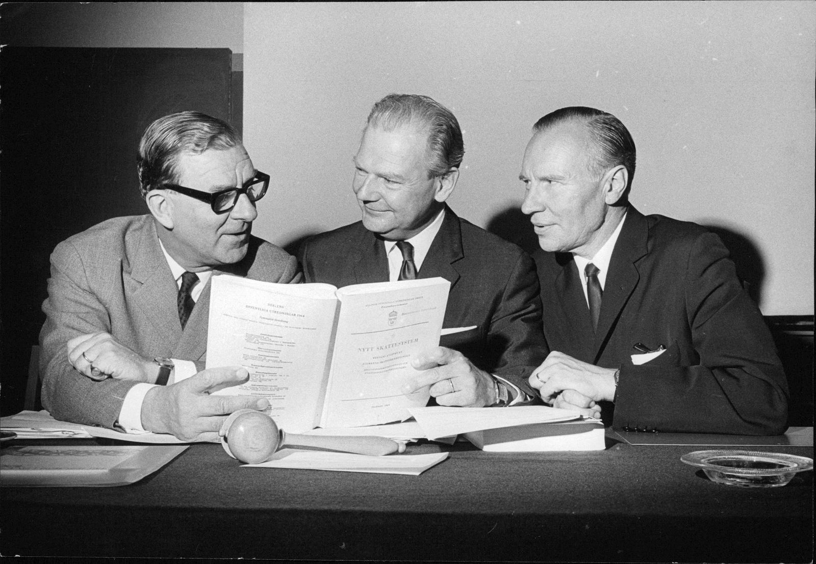 Nils Ahlgren (Motormännens Riksförbund), Rune Andréasson (Motorförarnas Helnykterhetsförbund) och Benkt Rosenquist (Motorbranschens Riksförbund). Bilden infördes i Svenska Dagbladet 1964-10-09 sid 3 (